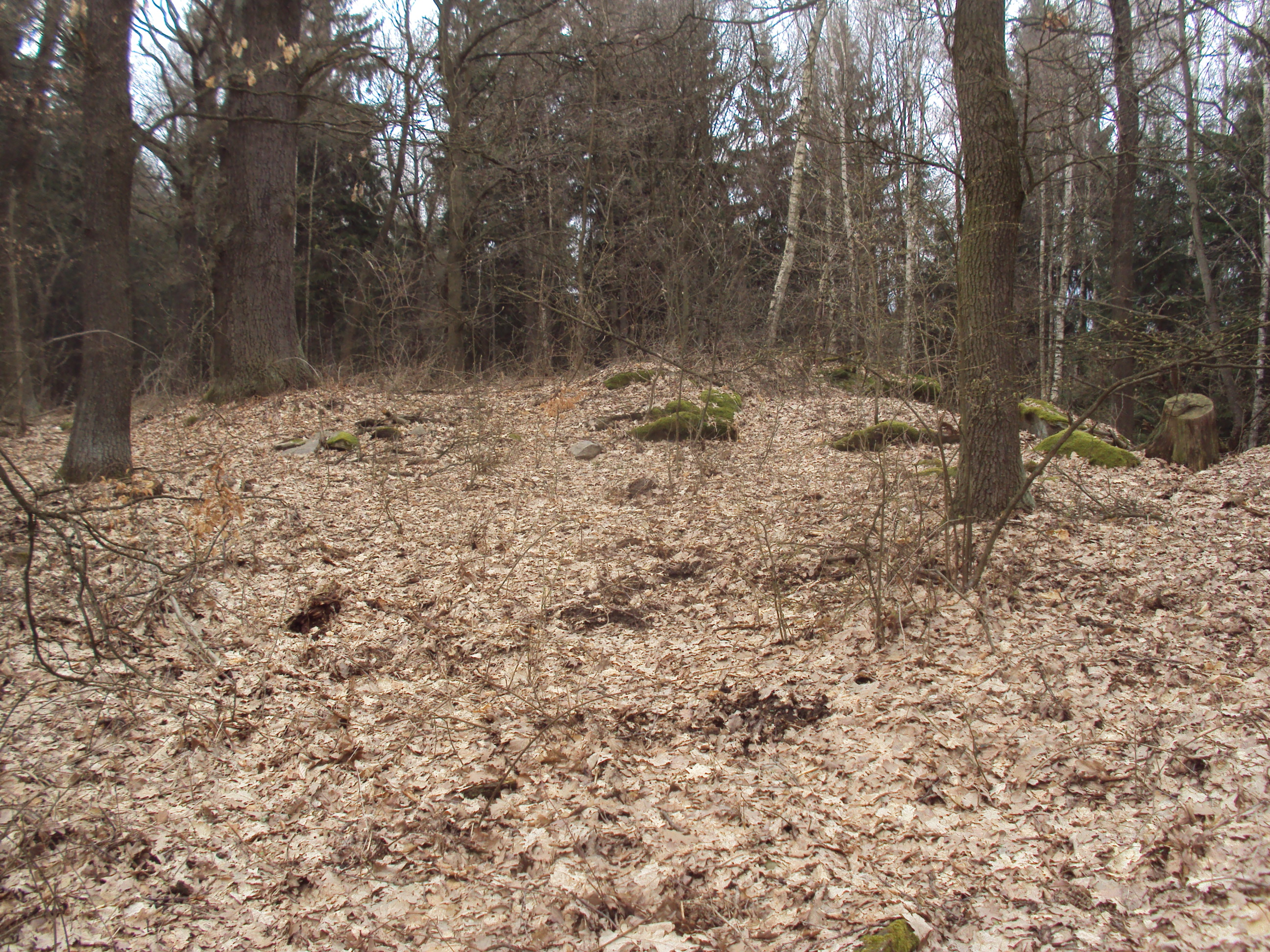 Vrchol kopce Mnišská hora 381 m mezi Bořetínem a Českou Lípou